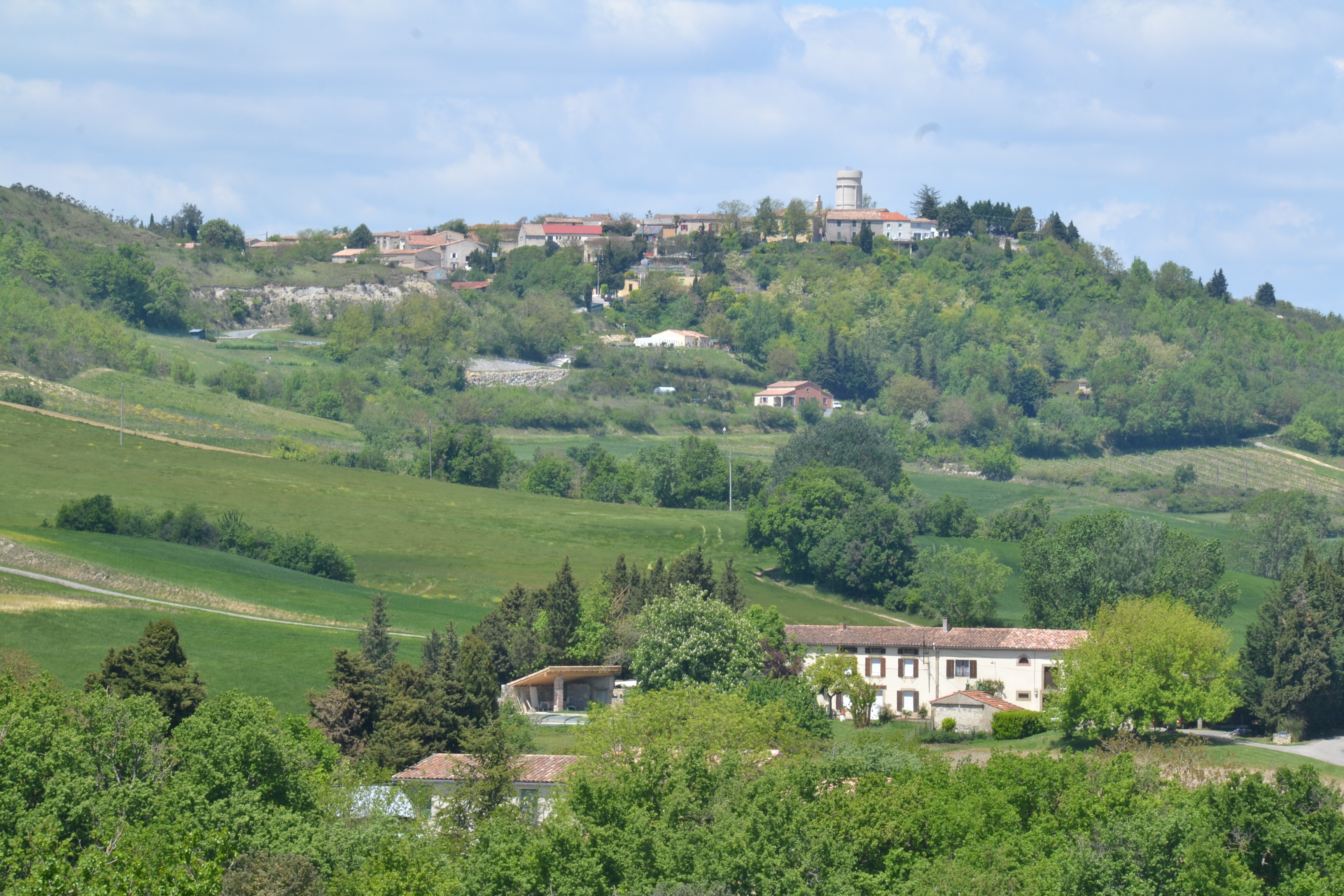 Hounoux (Aude, France).